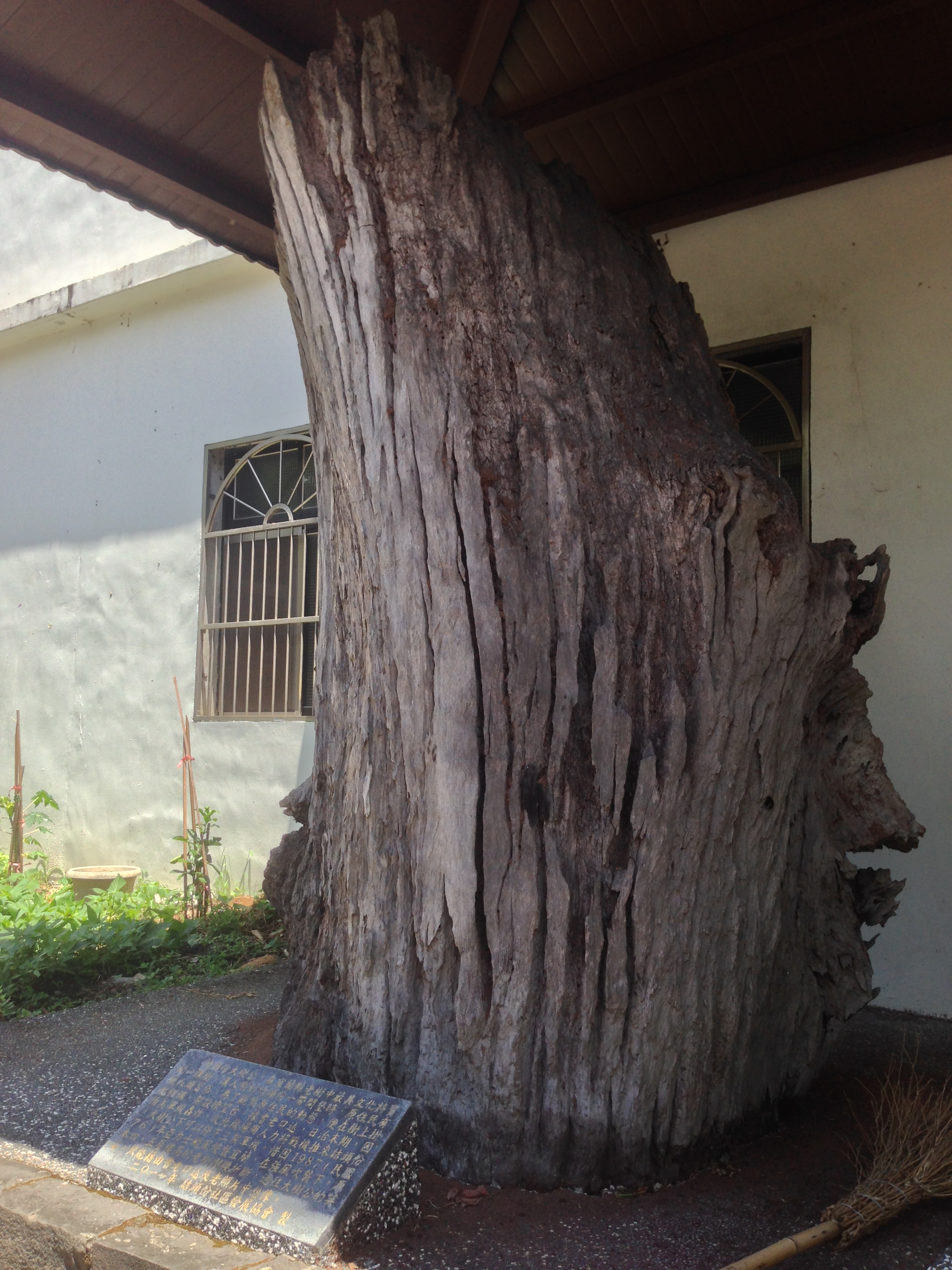 第一代員山結頭份大樹公